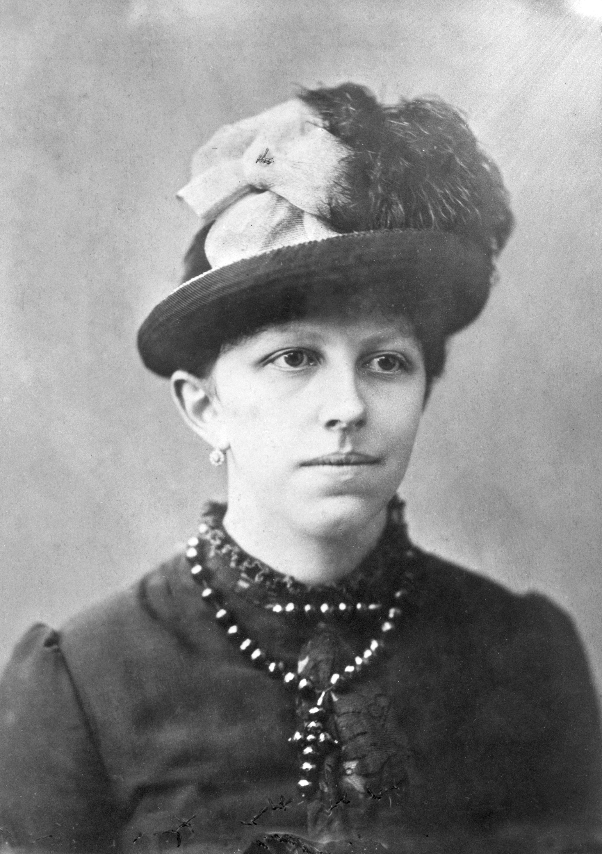 Nynke fan Hichtum, skûlnamme fan Sjoukje Maria Diederika Bokma de Boer (1860-1939)